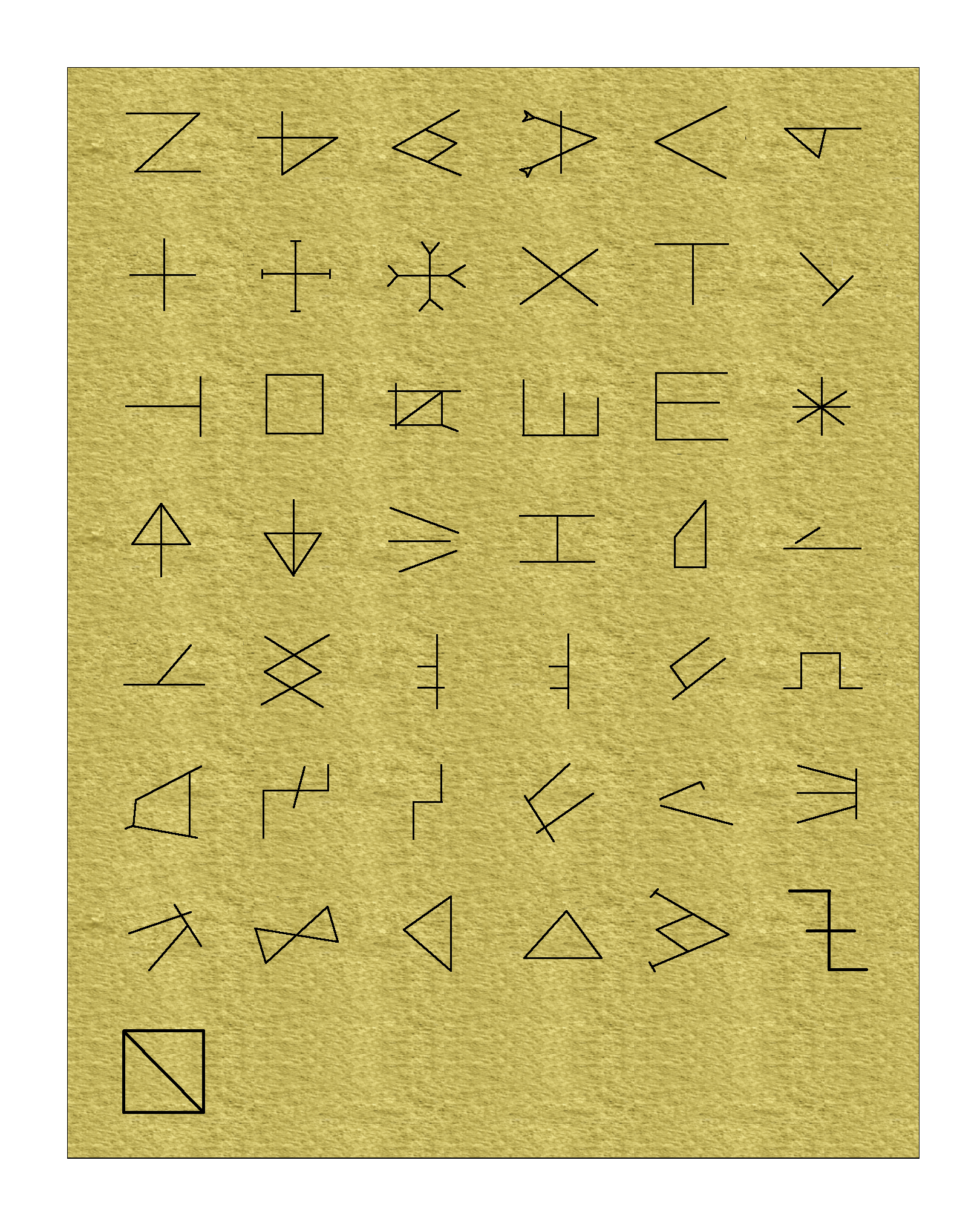 Ig. de Nuestra Sra. de las Fuentes, AMUSCO (Palencia) España, románica s XIII. Catálogo de Marcas de cantería.